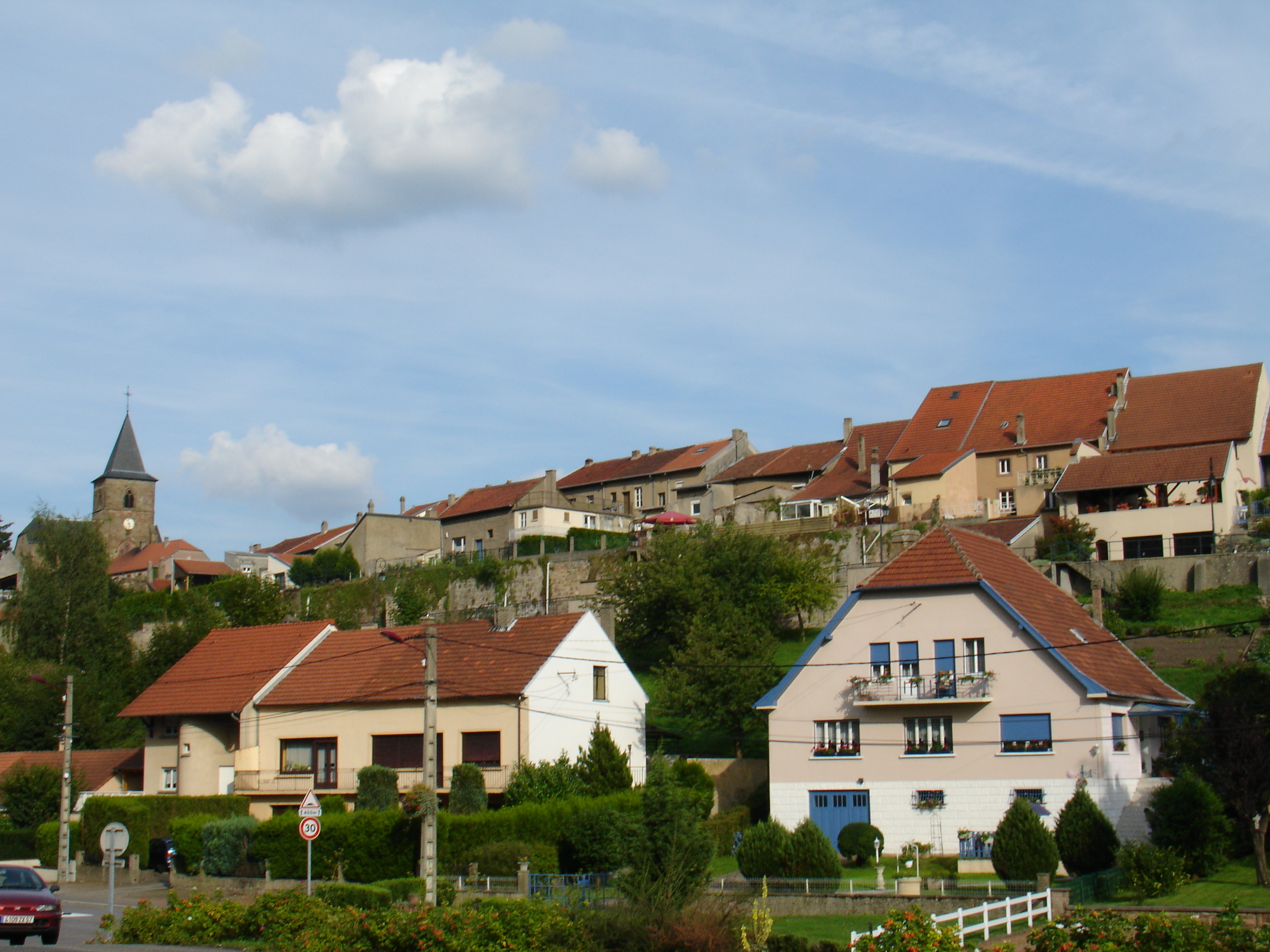 Le quartier du Vieux-Hombourg (Hombourg-Haut) vue de la gare.